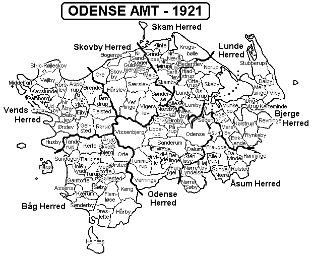 Administrative map of Odense Amt, Denmark, status 1921. Map by Svend-Erik Christiansen.